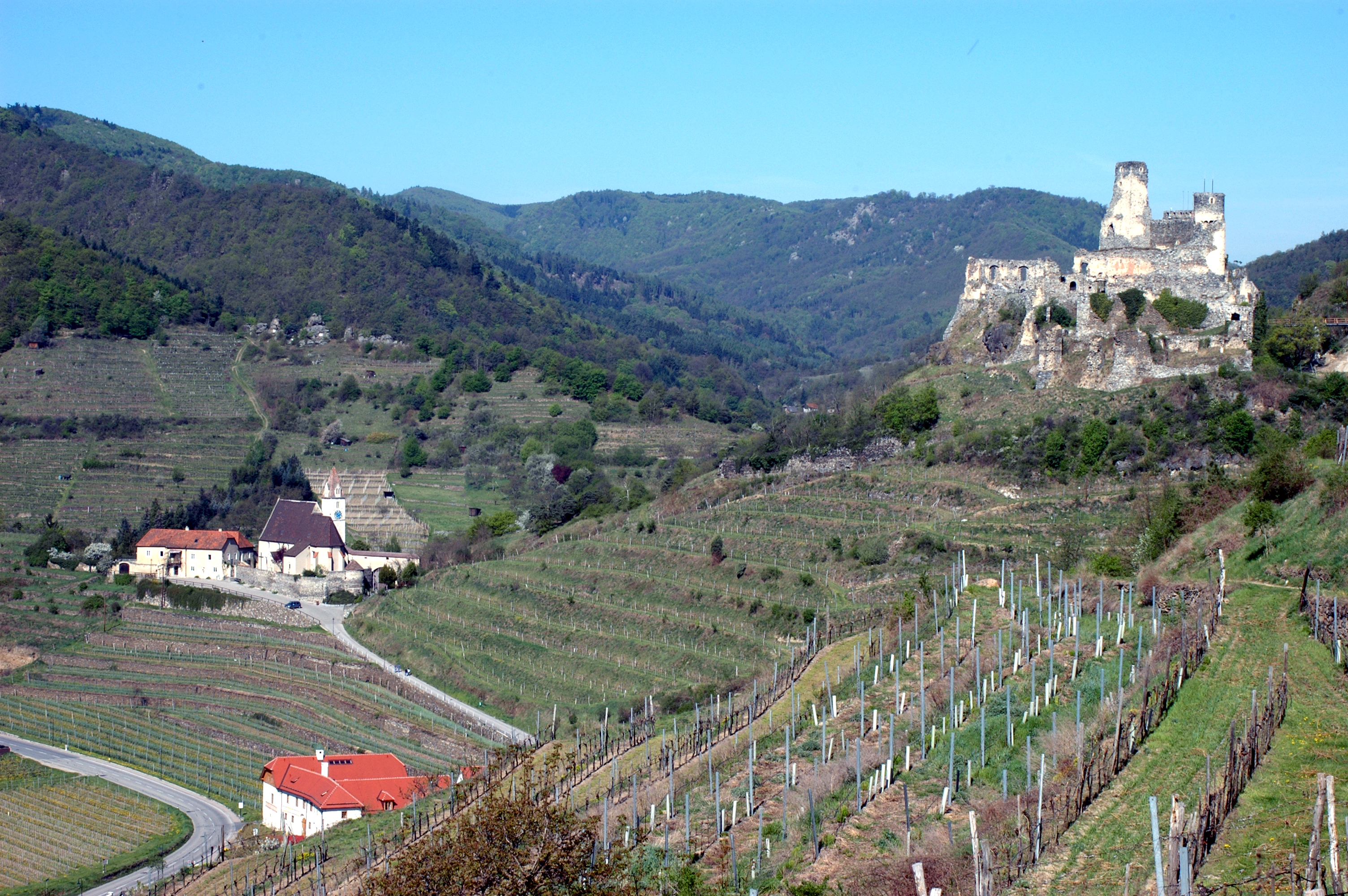 Blick auf die Pfarrkirche und Ruine Senftenberg im Kremstal